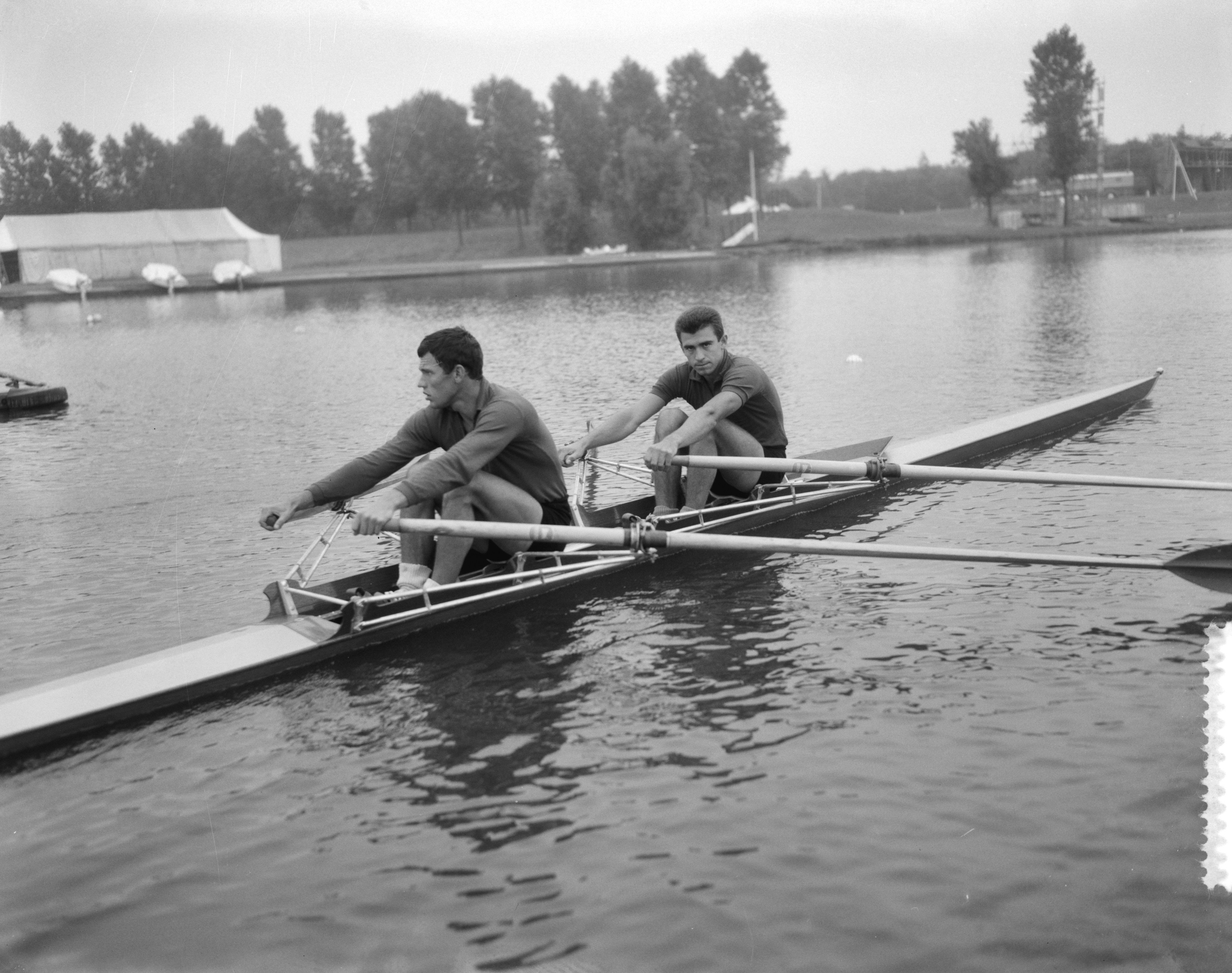 Training Europese roeikampioenschappen, dubbel 2 Rusland (Pubrovski en Tyurin)